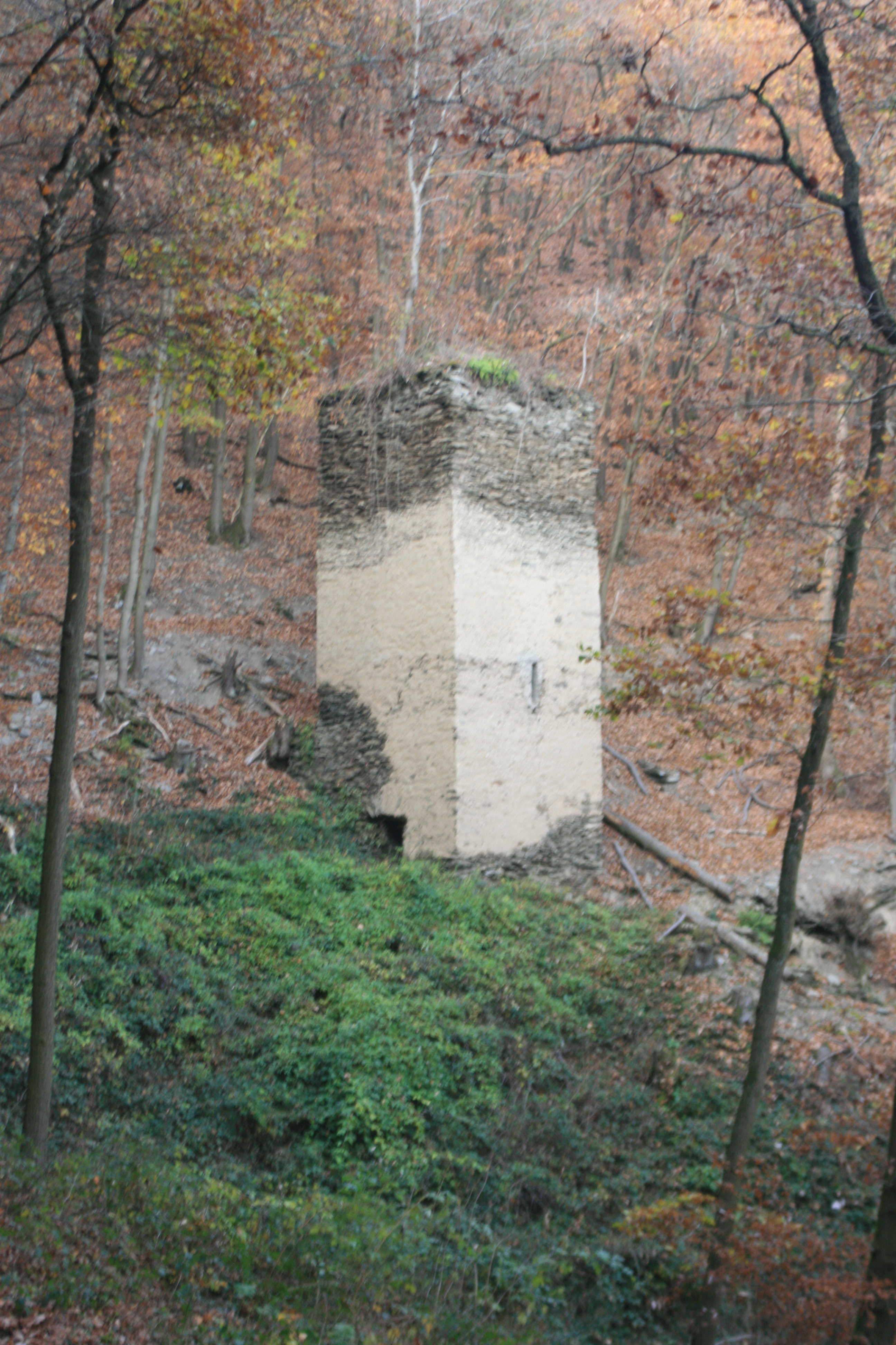 Sogenannter Pulverturm der Grube Gute Hoffnung bei St.Goarshausen-Wellmich. Ob der Turm diese Funktion während des Betriebes der Grube inne hatte, ist ungeklärt.